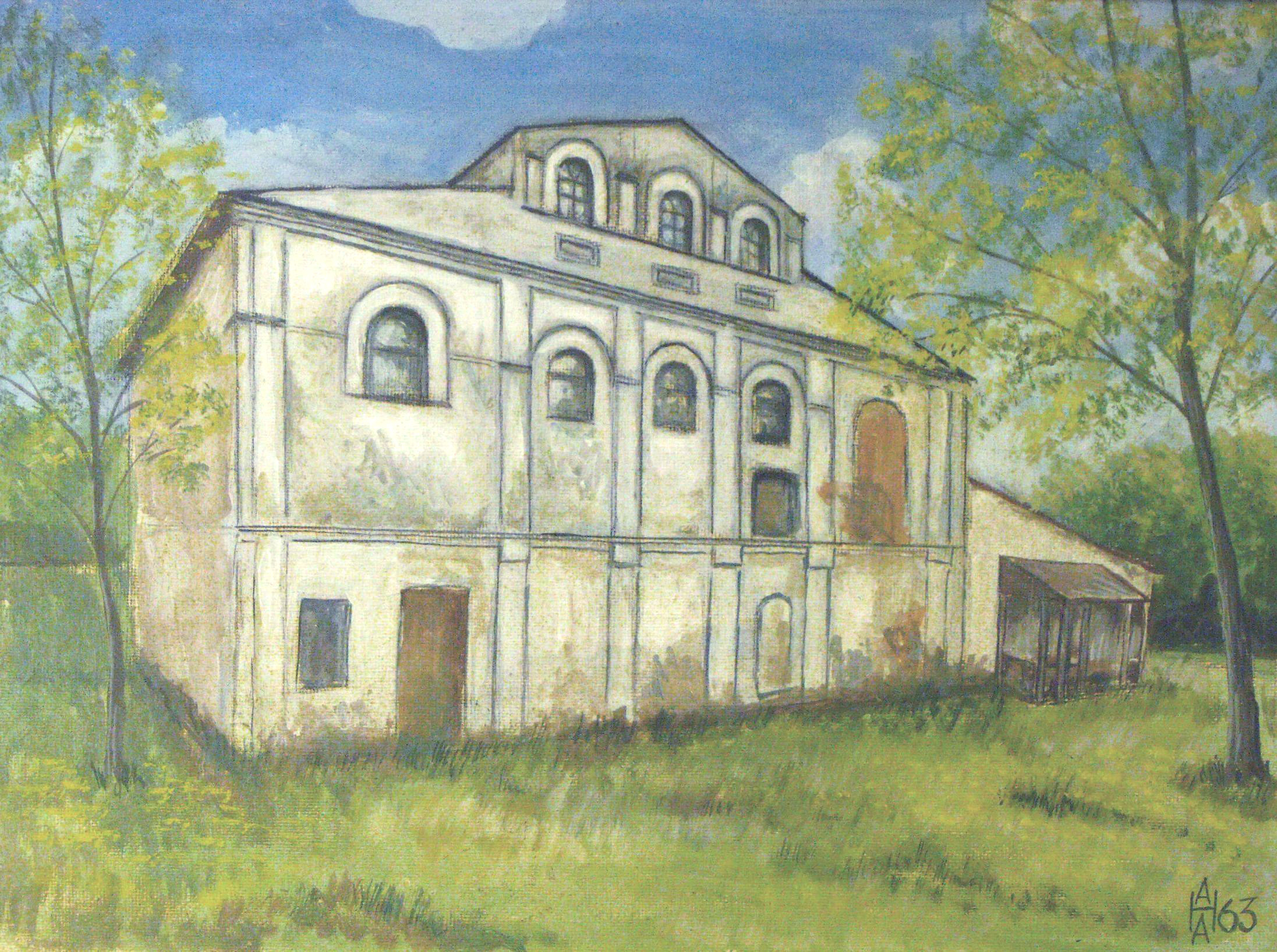 Синагога в Кобрине, 1963 год. Яичная темпера. ДВП. Художник Анатолий Александрович Наливаев.